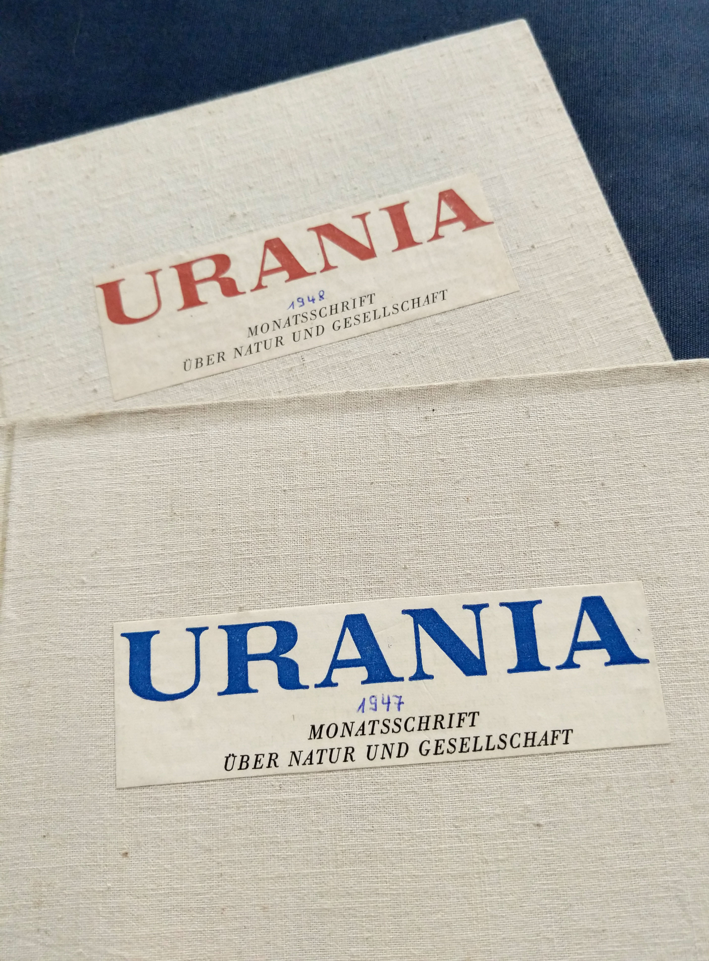 Urania 1947-48 Zeitschrift Jahresbände